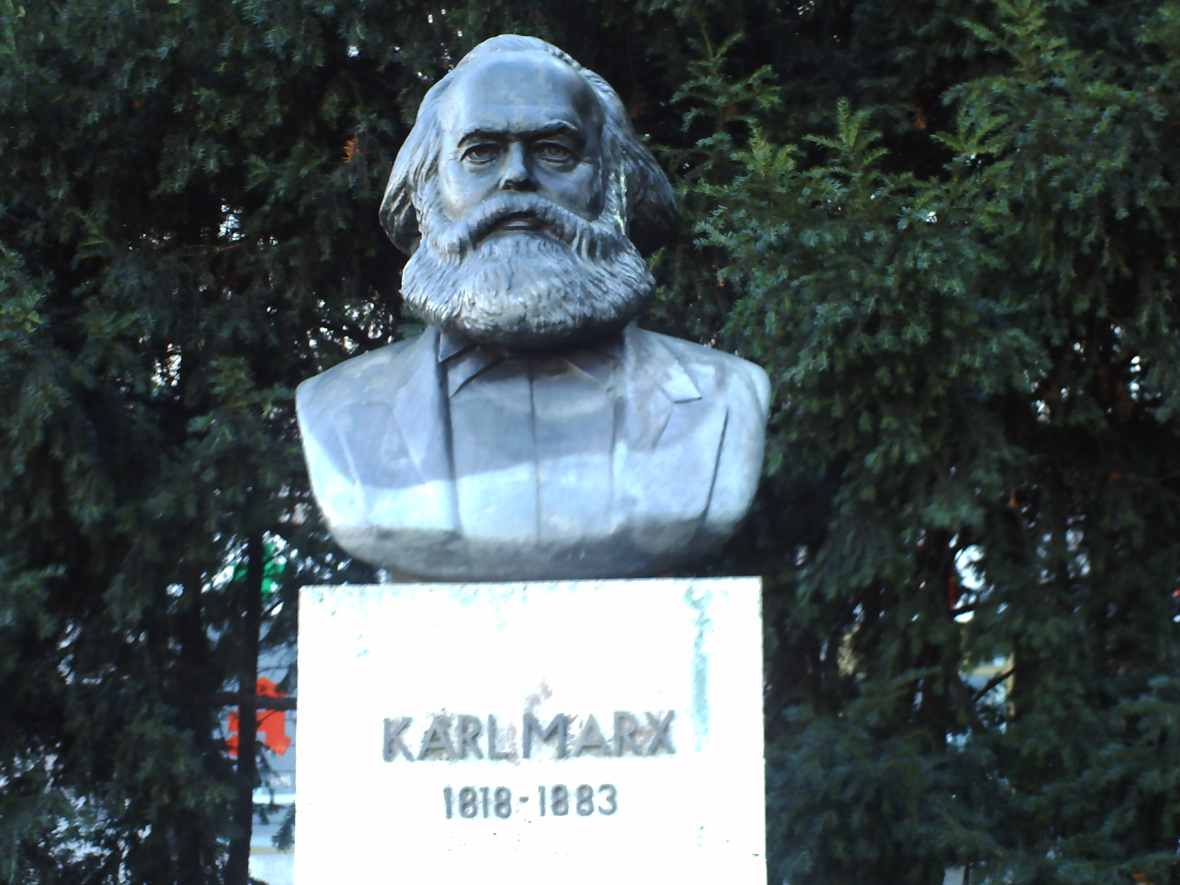 Estatua de Karl Marx en la Karl-Marx-Allee, Berlín.